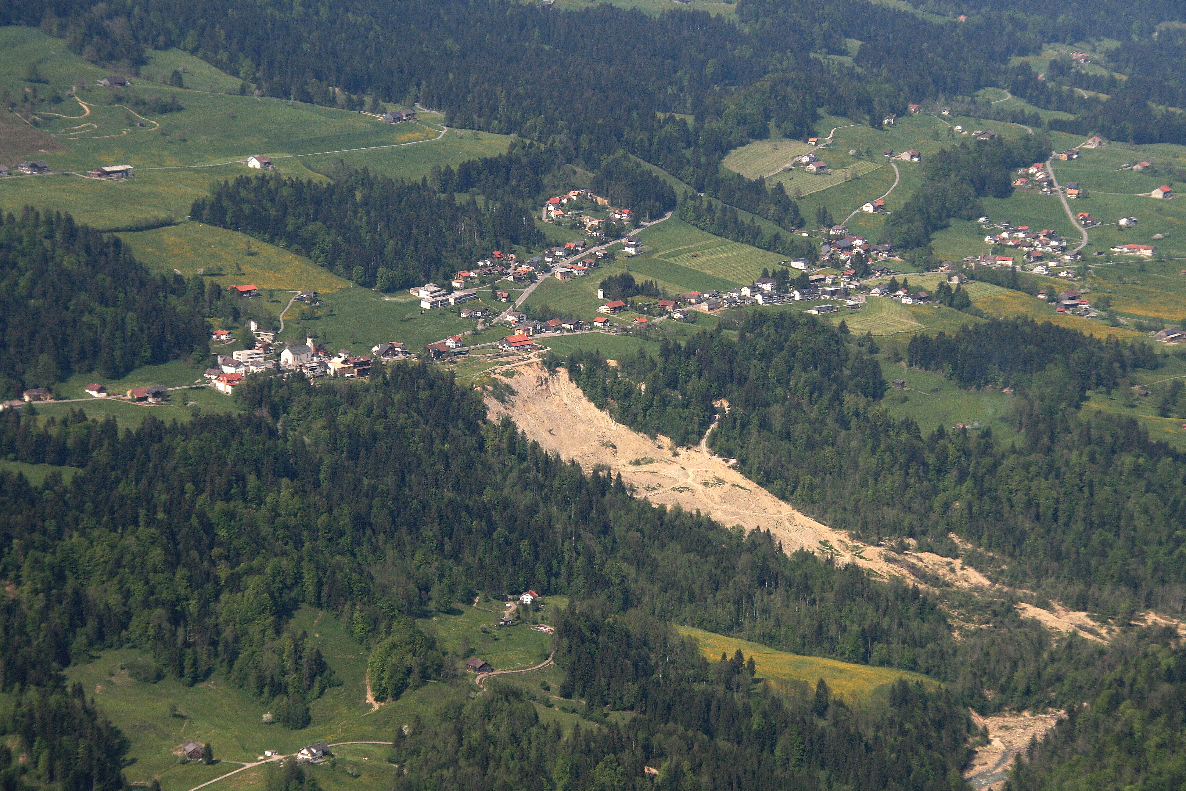 Luftaufnahme von Doren, aufgenommen während eines Fluges mit einer Propellermaschine des Types: D-EJCR Robin DR400-180R. Flughöhe ca. 1800m. Im Bildvordergrund das "Dorener Gschlief".